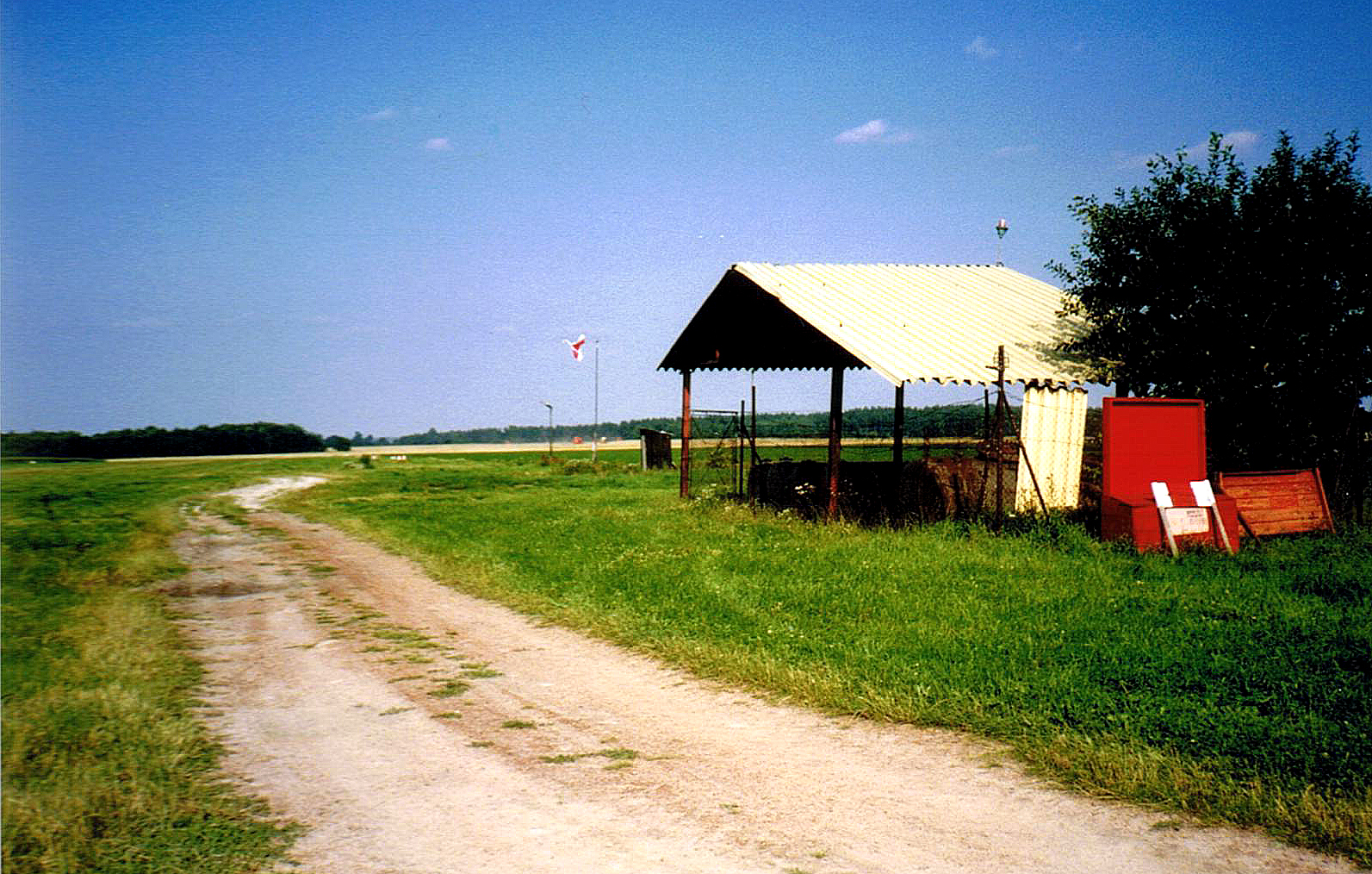 Tarnogród, Poland - Agrary airfield • Tarnogród, Polska - Lotnisko rolnicze